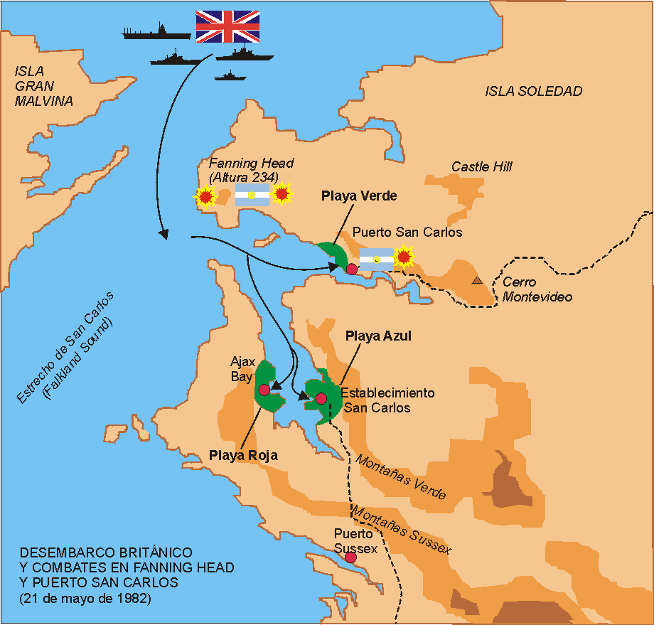 Mapa de la costa de Isla Soledad donde se produjo el desembarco inglés (21-05-1982). Plan de desembarco, posiciones argentinas y combates.